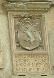 Arezzo, palazzo pretorio, stemma gianfigliazzi